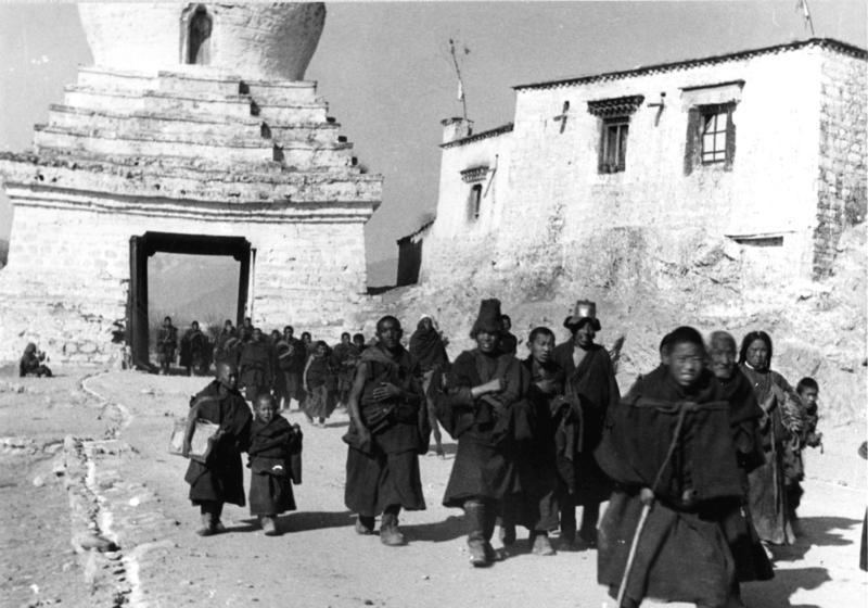 Lhasa, Einzug der Lamas zum Mönlon